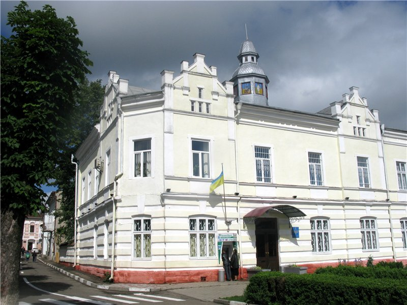 Ратуша